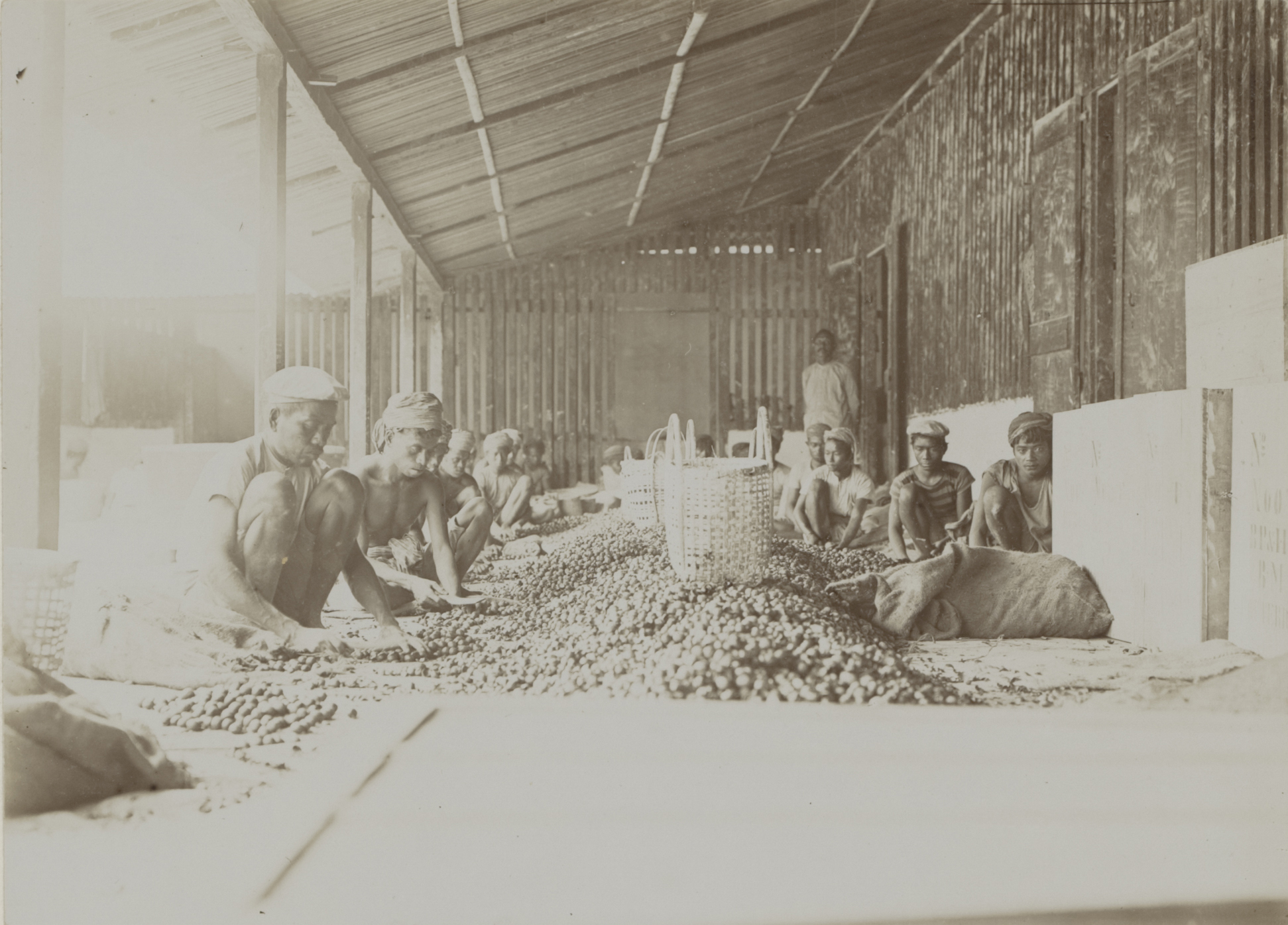 Academische Collecties: 1899-1900, Siboga-expeditie naar Nederlands Oost-Indië, onder leiding van Max Wilhelm Carl Weber Pakhuis, waarin de nootmuskaatnoten worden verwerkt en verpakt in balen. Op de achtergrond in de hoek waarschijnlijk de perkenier.